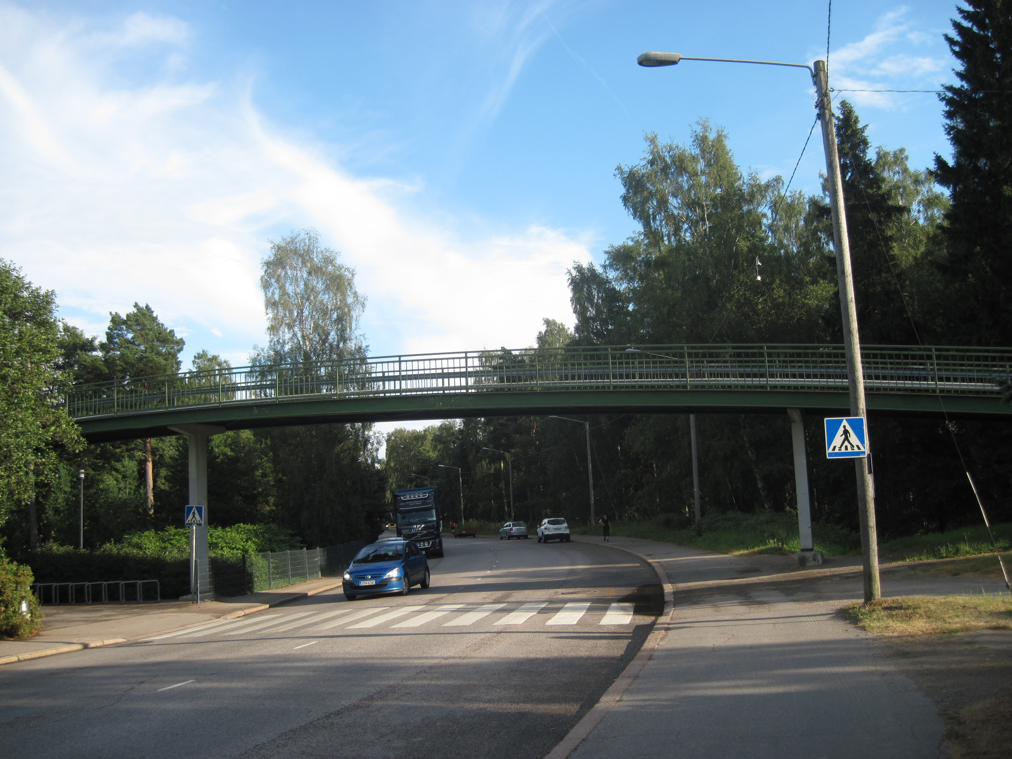 Pedestrian Bride across Särkiniementie, Lauttasaari, Helsinki